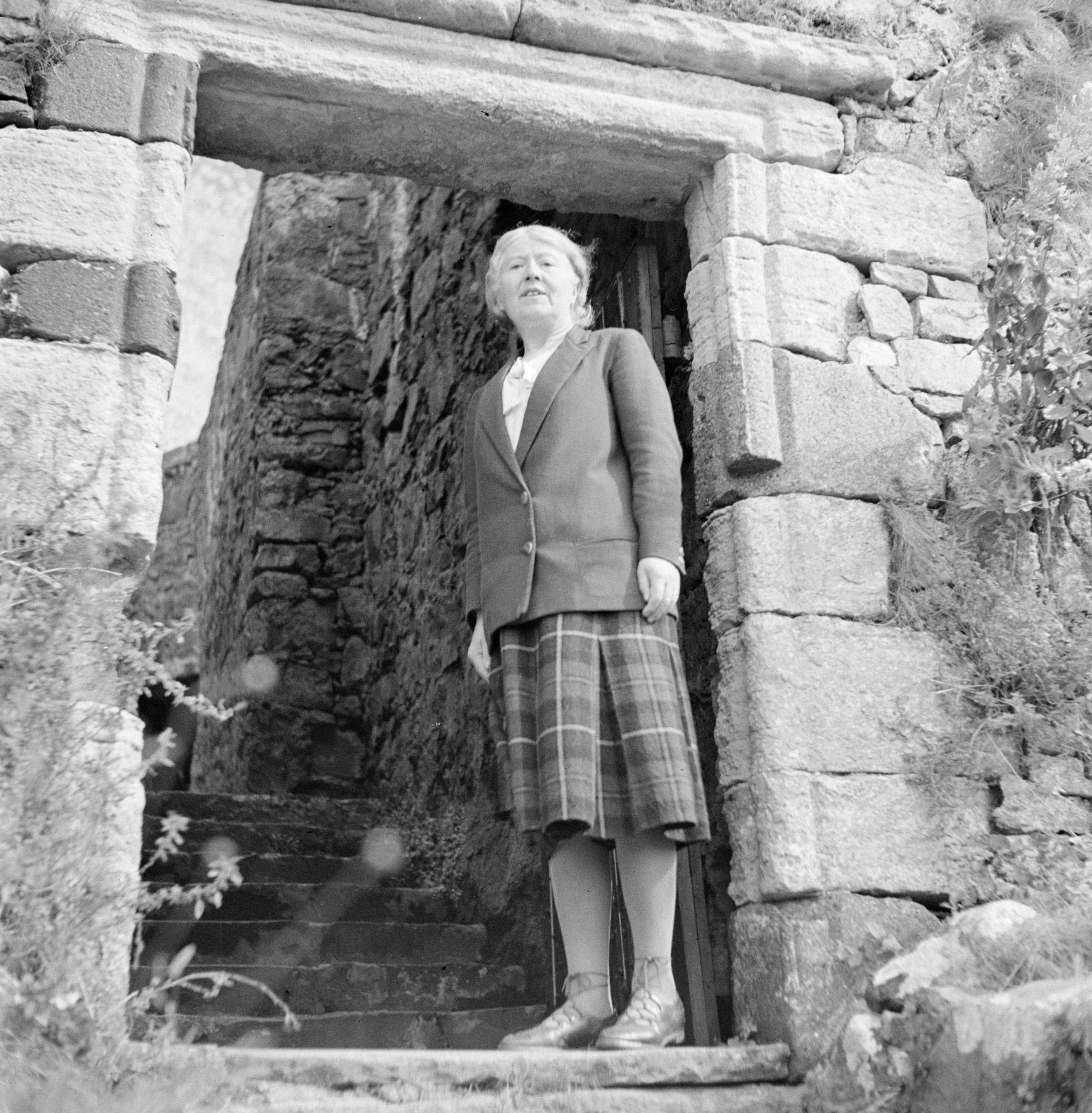 Collectie / Archief : Fotocollectie Van de Poll Reportage / Serie : Schotland - The Highlands Beschrijving : Dame Flora MacLeod of MacLeod op Dunvegan Castle, een kasteel dat toebehoort aan de clan MacLeod Annotatie : Dame Flora MacLeod of MacLeod was vanaf 1935 het 28ste en eerste vrouwelijke hoofd van de clan Datum : 1934 Locatie : Groot-Brittannië, Schotland Trefwoorden : adel, kastelen Persoonsnaam : MacLeod of MacLeod, Flora Fotograaf : Poll, Willem van de Auteursrechthebbende : Nationaal Archief Materiaalsoort : Negatief (zwart/wit) Nummer archiefinventaris : bekijk toegang 2.24.14.02 Bestanddeelnummer : 252-0170